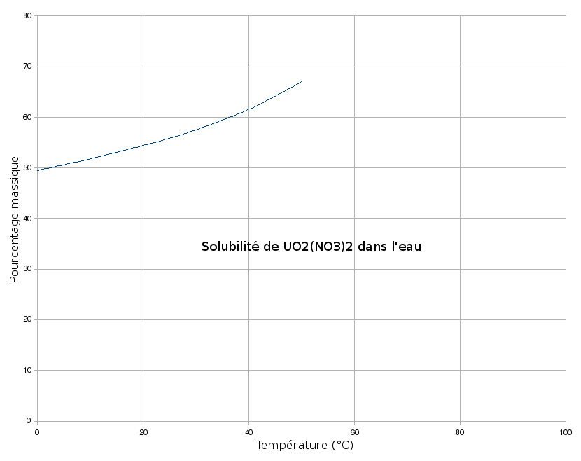 Solubilité de UO2(NO3)2 dans l'eau en fonction de la température.